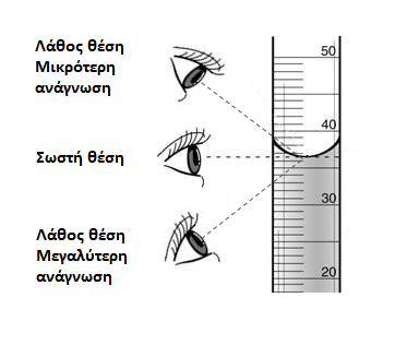 Meniscus